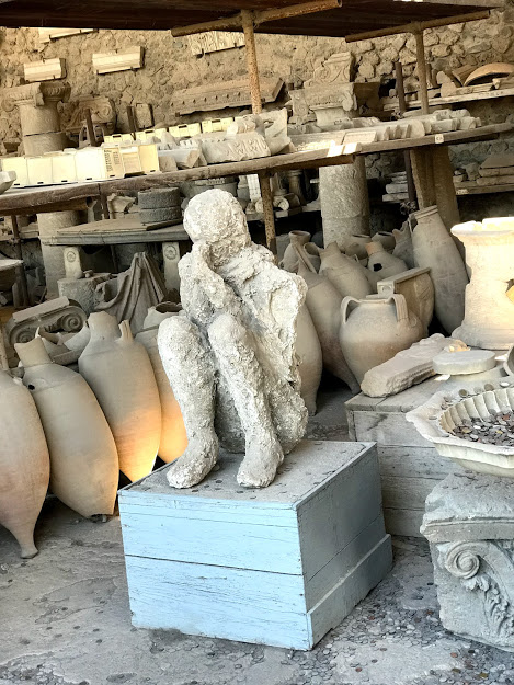 Fotografía tomada al visitar el museo arqueológico de Pompeya, Italia